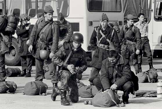 Umik JLA iz Slovenije v koperskem pristanišču.